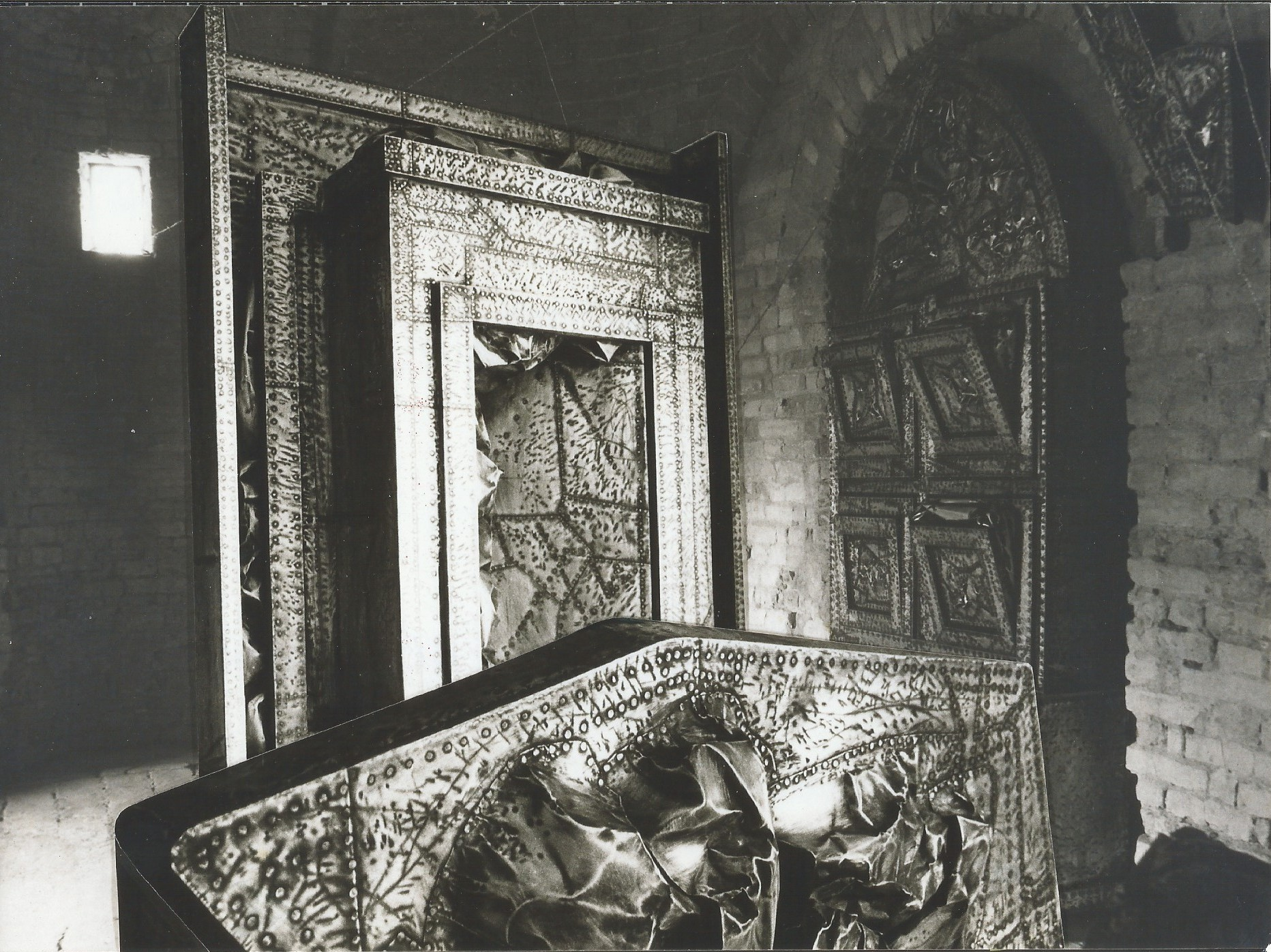 Allestimento montato all'interno della torre campanaria della chiesa di Sacerno (BO) dal 20 settembre al 20 ottobre 1981. Opera dello scultore Roberto Tirelli da titolo "Un tempio di pace, oltre la vita al di sopra delle parti"